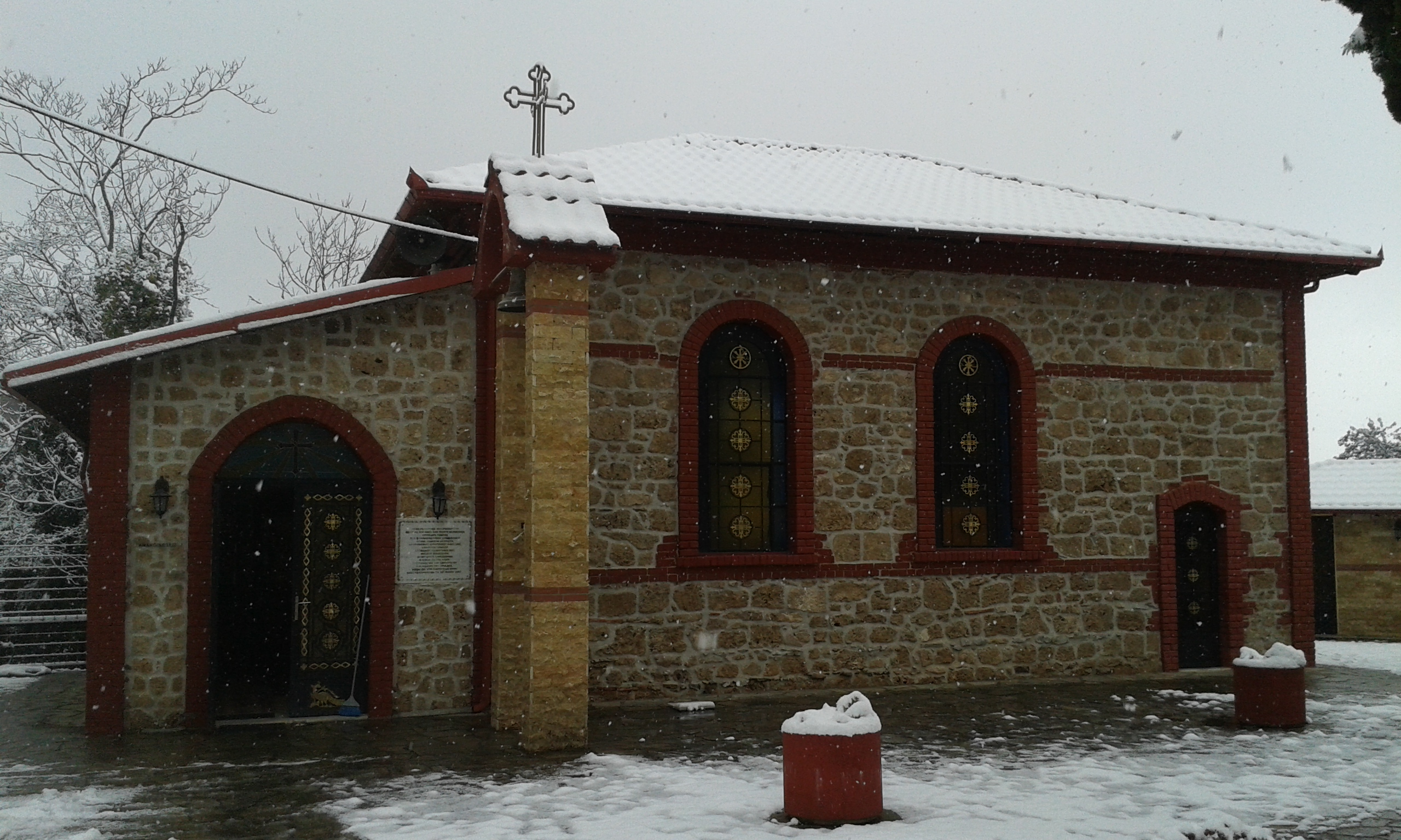 Αγία Τριάδα εκκλησία